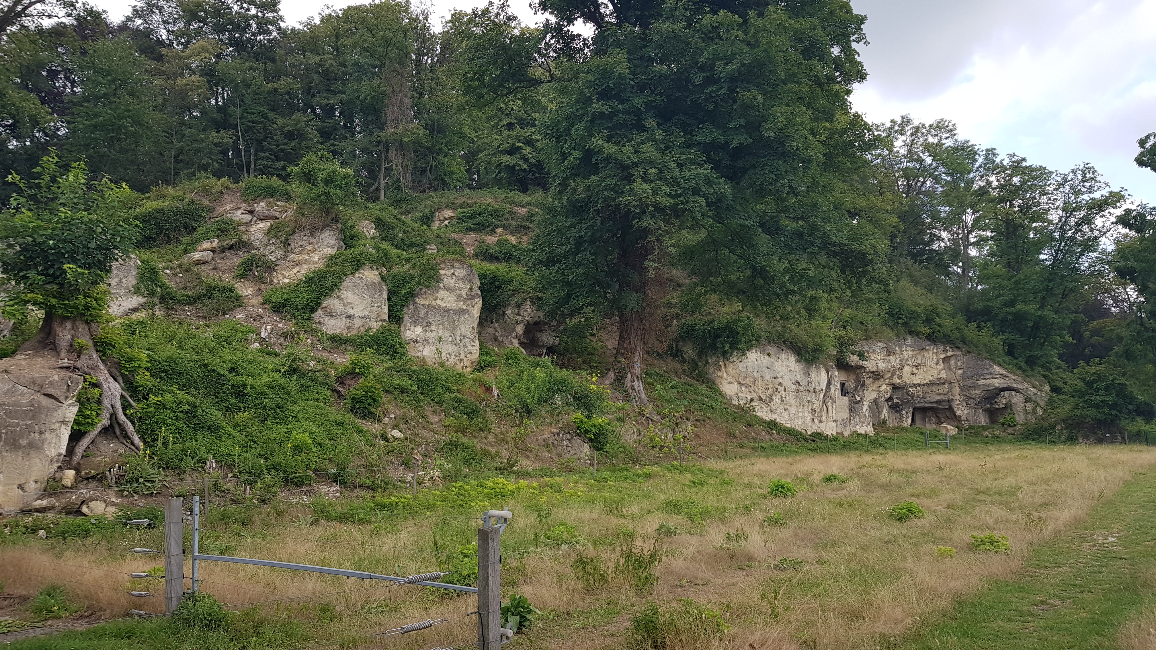 Riesenberggroeve (links) en Groeve boven op de Riesenberg (rechts) in het Savelsbos, Gronsveld, Nederland